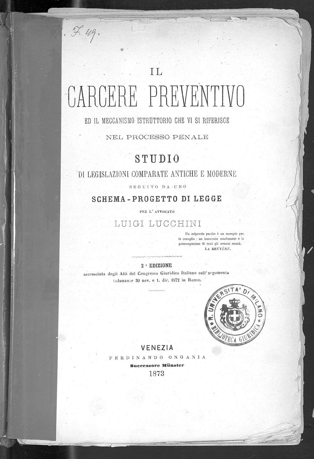 Frontespizio